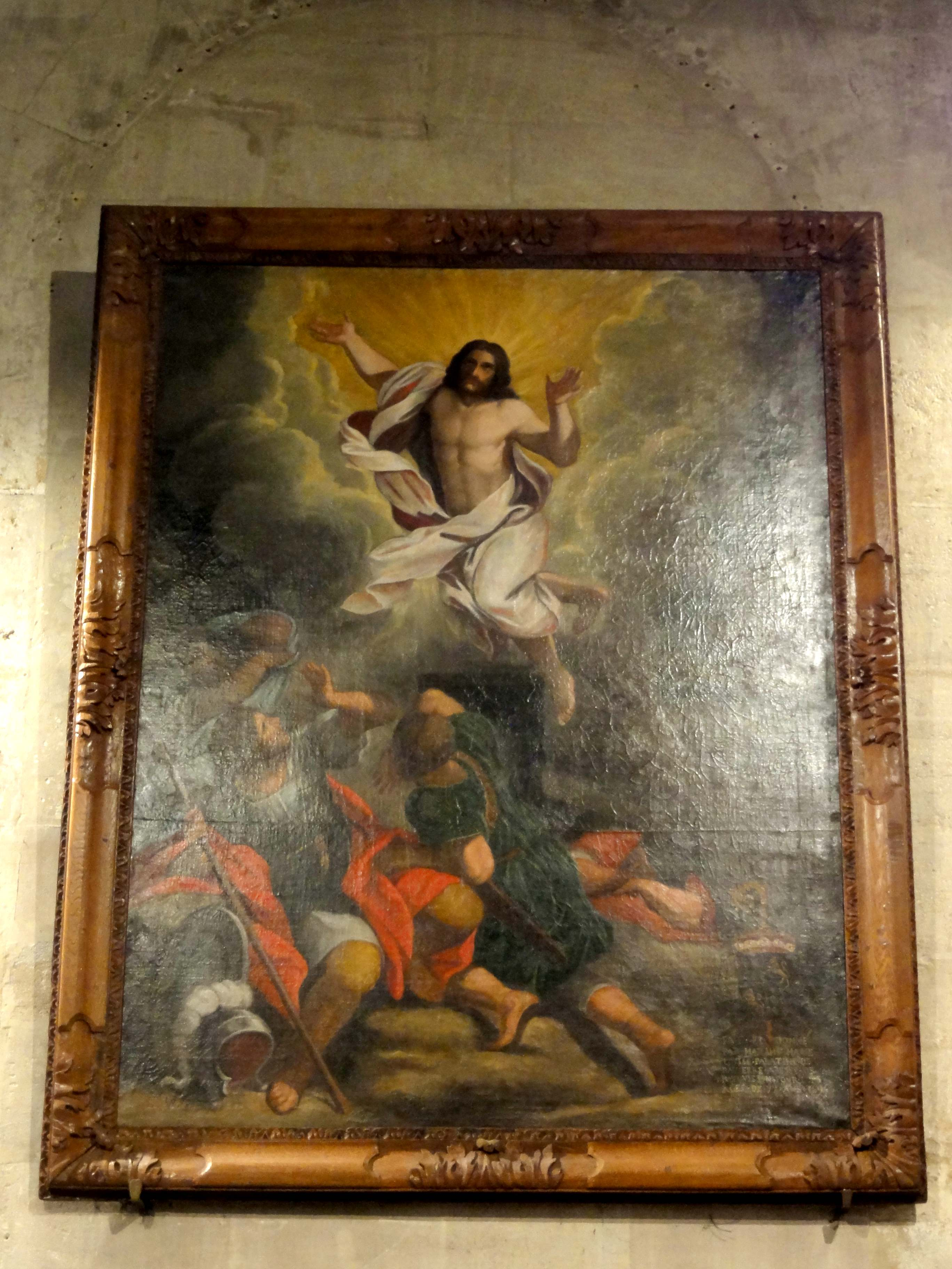 Tableau - La Résurrection.